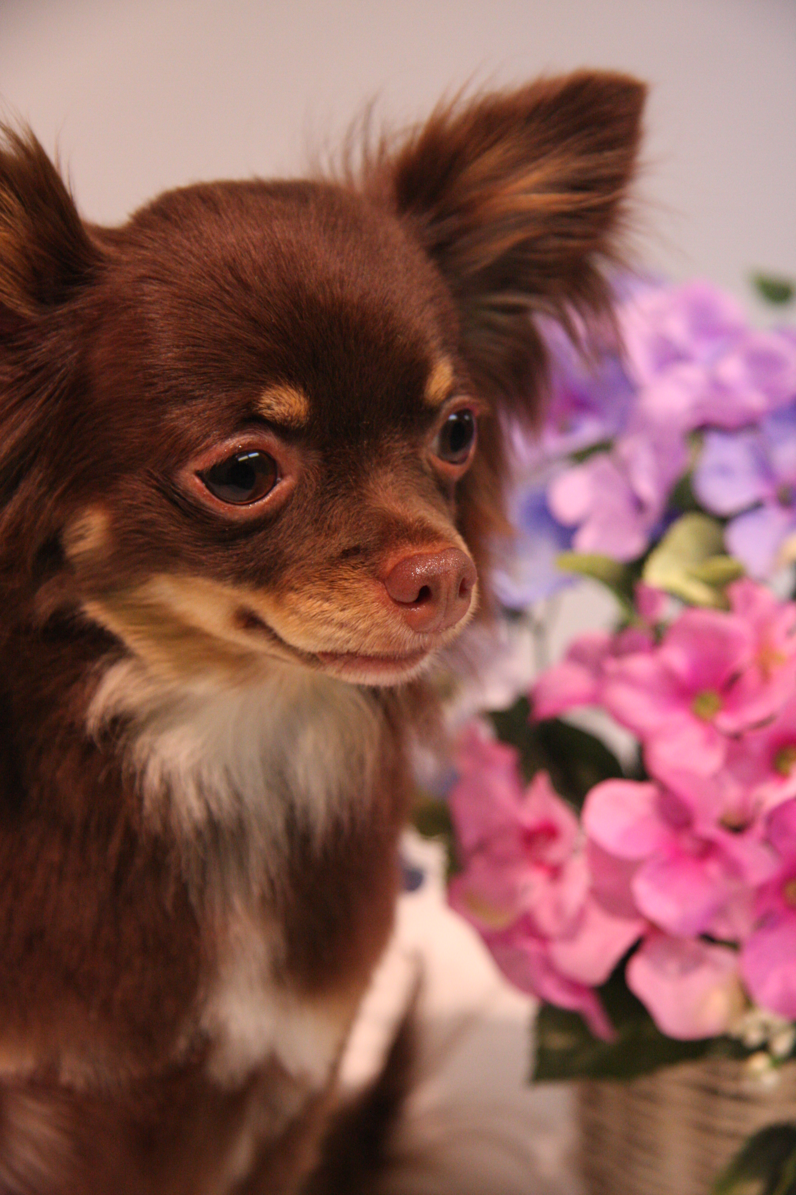 チワワ（ロングコート）